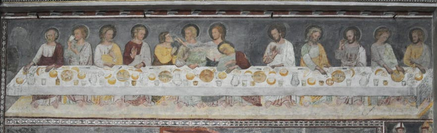 L'affresco trecentesco dell'Ultima cena dentro la Basilica di Santa Maria Maggiore a Bergamo